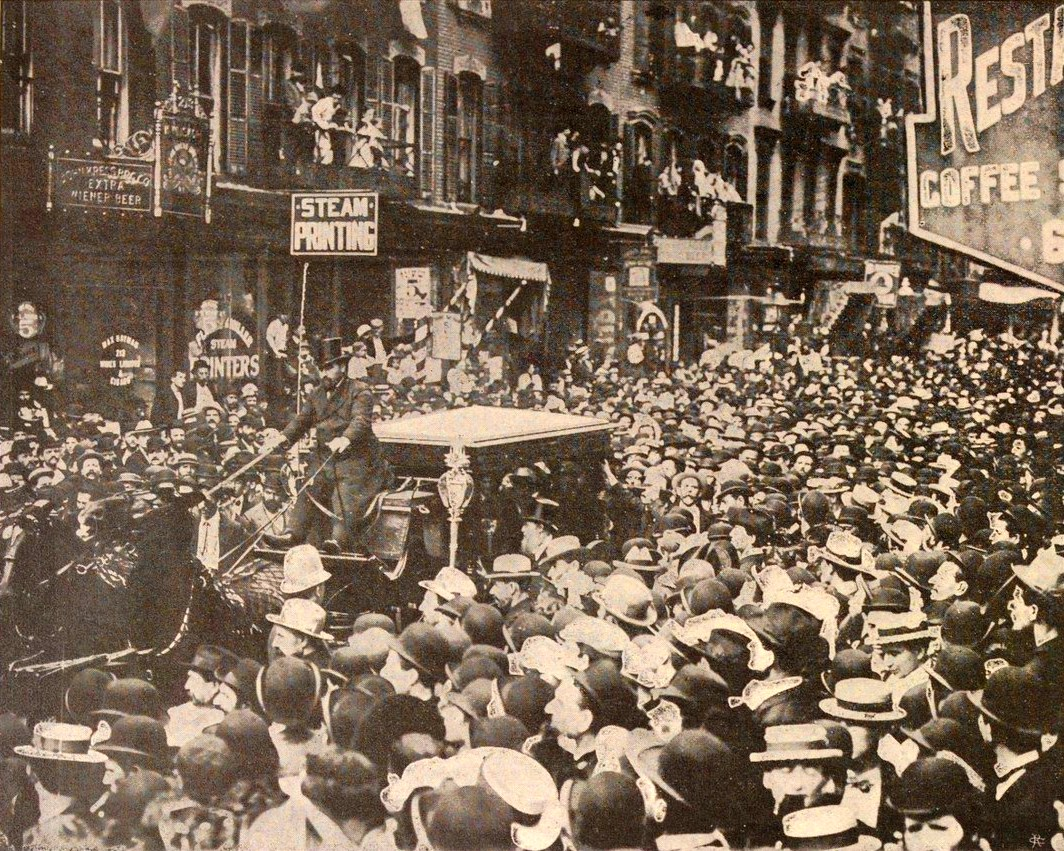 "New York. Manifestation et bagarre à l'enterrement du Grand Rabbin : 200 blessés".